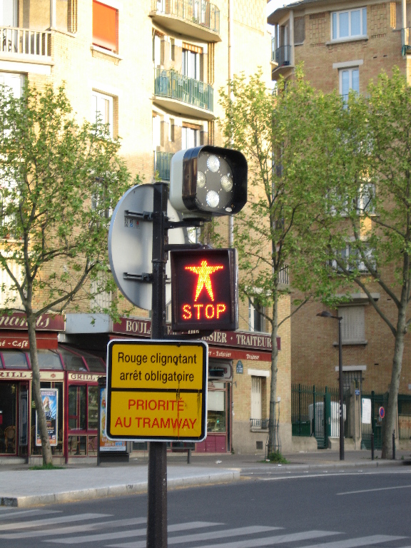 Signalisation piétons R25 et d'alimentation électrique (+ en haut) à Paris sur le T3, porte de Vanves.